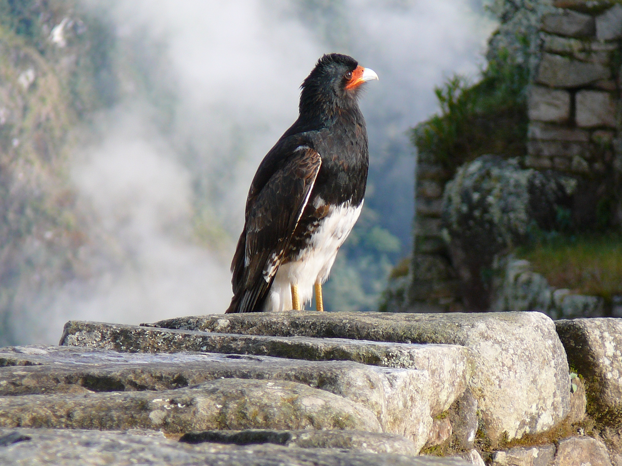 Big Bird in Machu Picchu, Peru